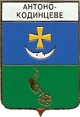 Герб Антоново-Кодинцева